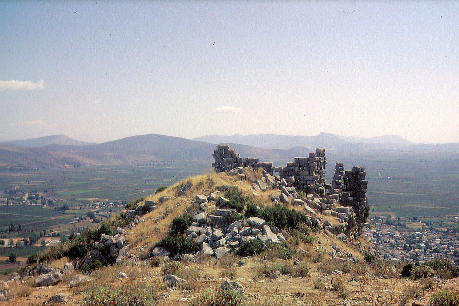 Akropolis von Orchomenos aus West